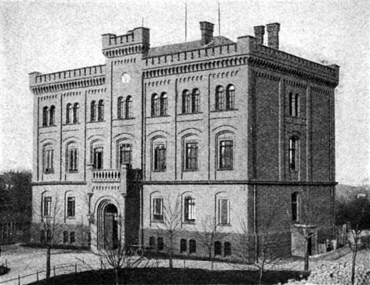 Rathaus der Bürgermeisterei Altendorf (1874-1901)